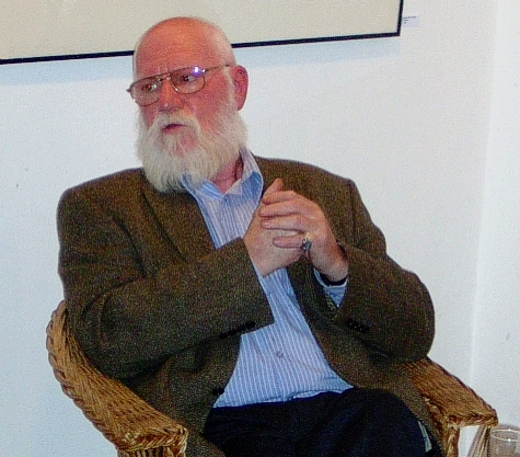 Der Maler Ronald Paris während einer Ausstellungseröffnung in Berlin-Friedrichshagen, Oktober 2006